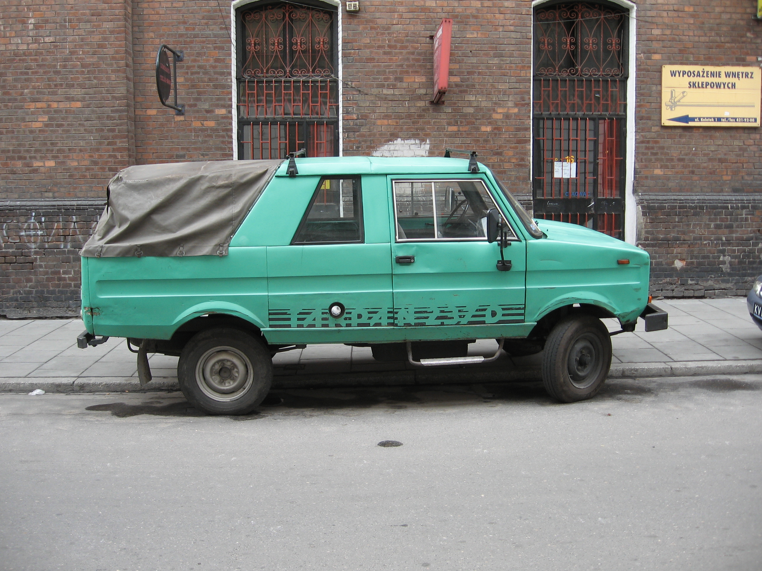 Tarpan 237D